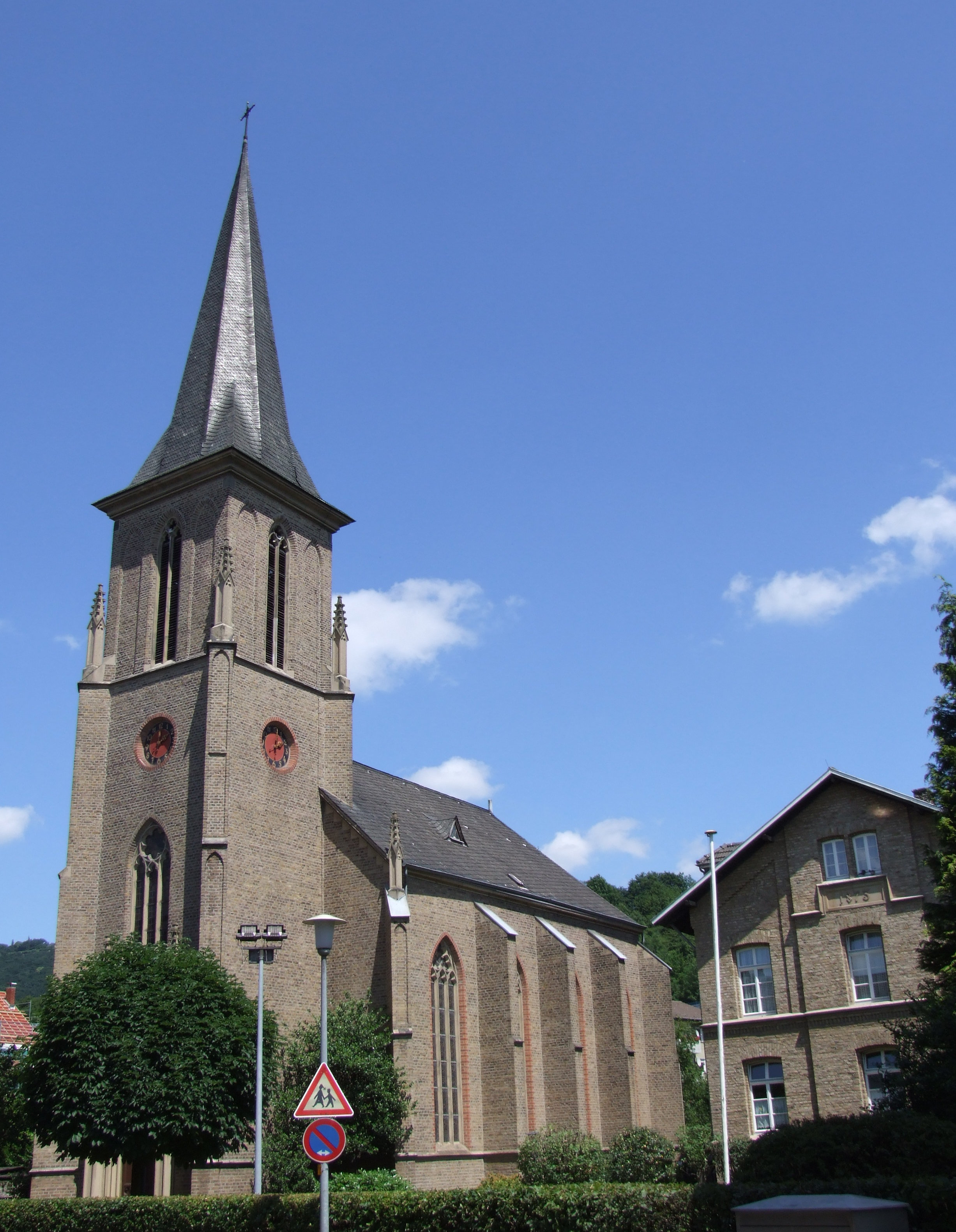 Königswinter, Evangelische Kirche Königswinter Altstadt